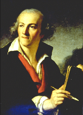 Louis-Joseph Jay, professeur de peinture et fondateur du musée de Grenoble en février 1798.